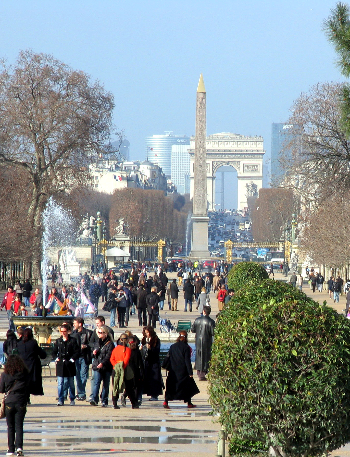 Axe historique, Paris, France : au premier plan le jardin des Tuileries, puis successivement l'obélisque de la place de la Concorde, les Champs Elysées, l'Arc de Triomphe (à environ 3 km), les gratte-ciel de la La Défense et enfin l'Arche de la Défense dont ont voit la gaine d'ascenceur extérieur sous l'Arc de Triomphe (à environ 10 km). Le Louvre est derrière le photographe.